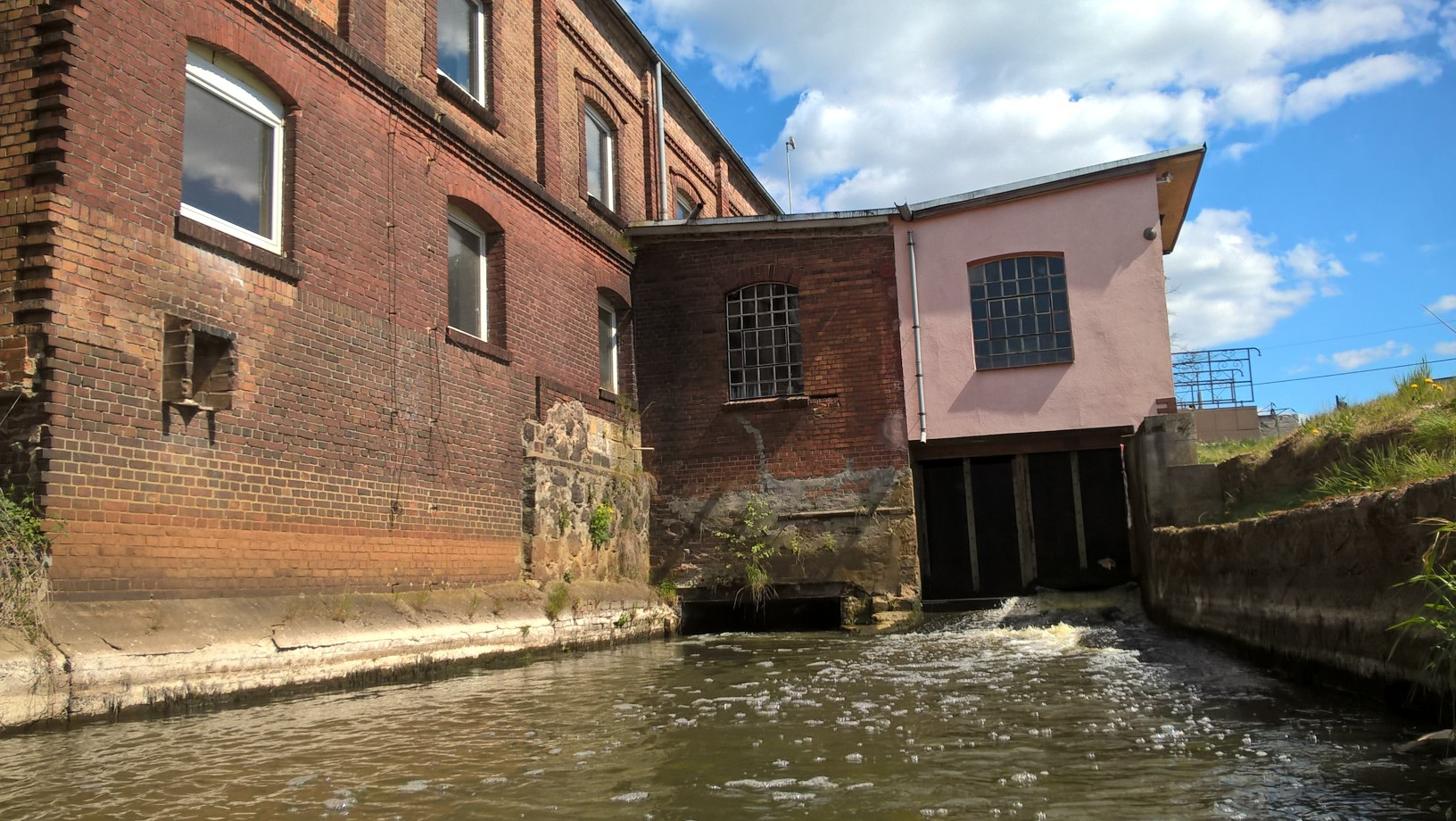 Mała elektrownia wodna na rzece Szprotawa w Henrykowie. Trzy pokolenia: elektrownia wodna współcześnie, wcześniej młyn murowany cegłą, dawniej młyn murowany kamieniem.